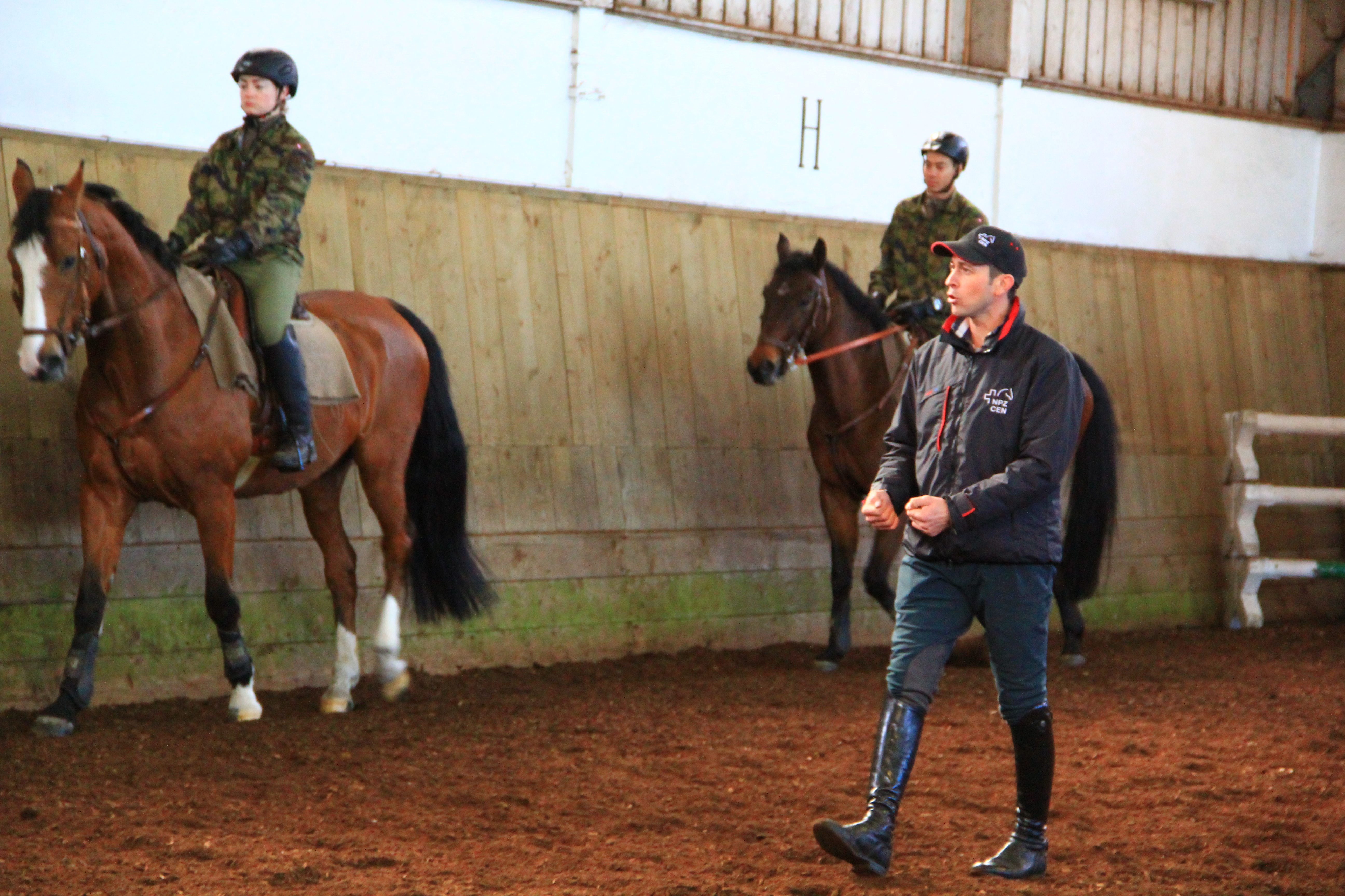 Ausbildung des VBS im Nationalen Pferdezentrum Bern